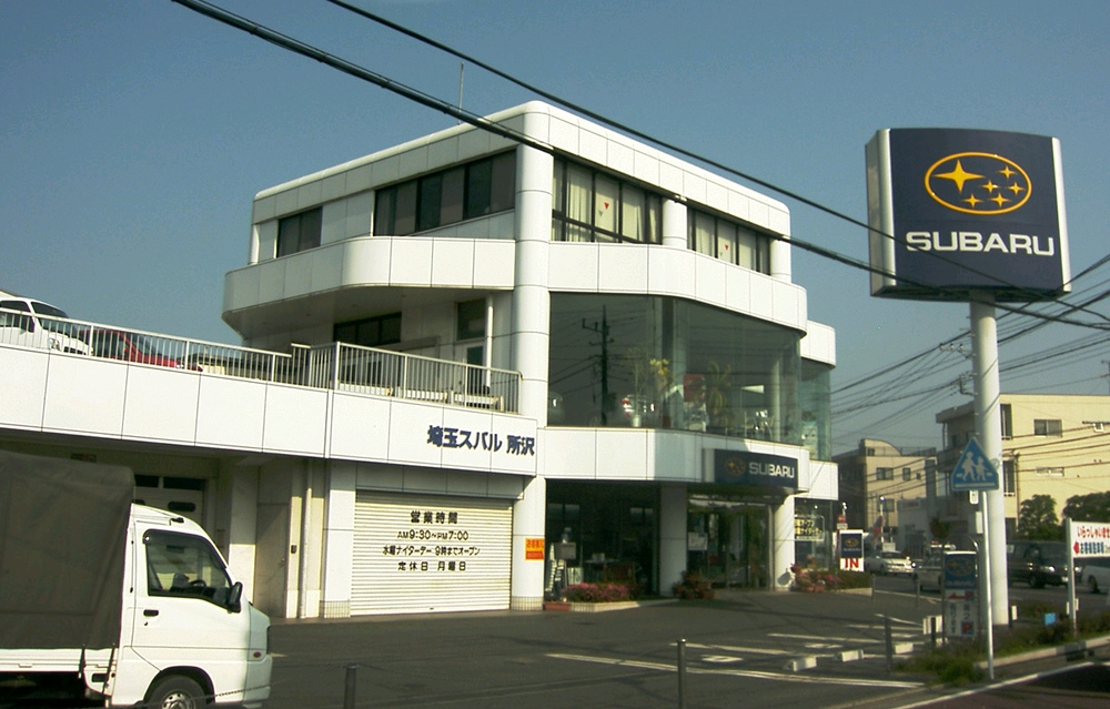 Fuji Heavy Industries“Subaru_Car_dealership_Tokorozawa_Saitama”